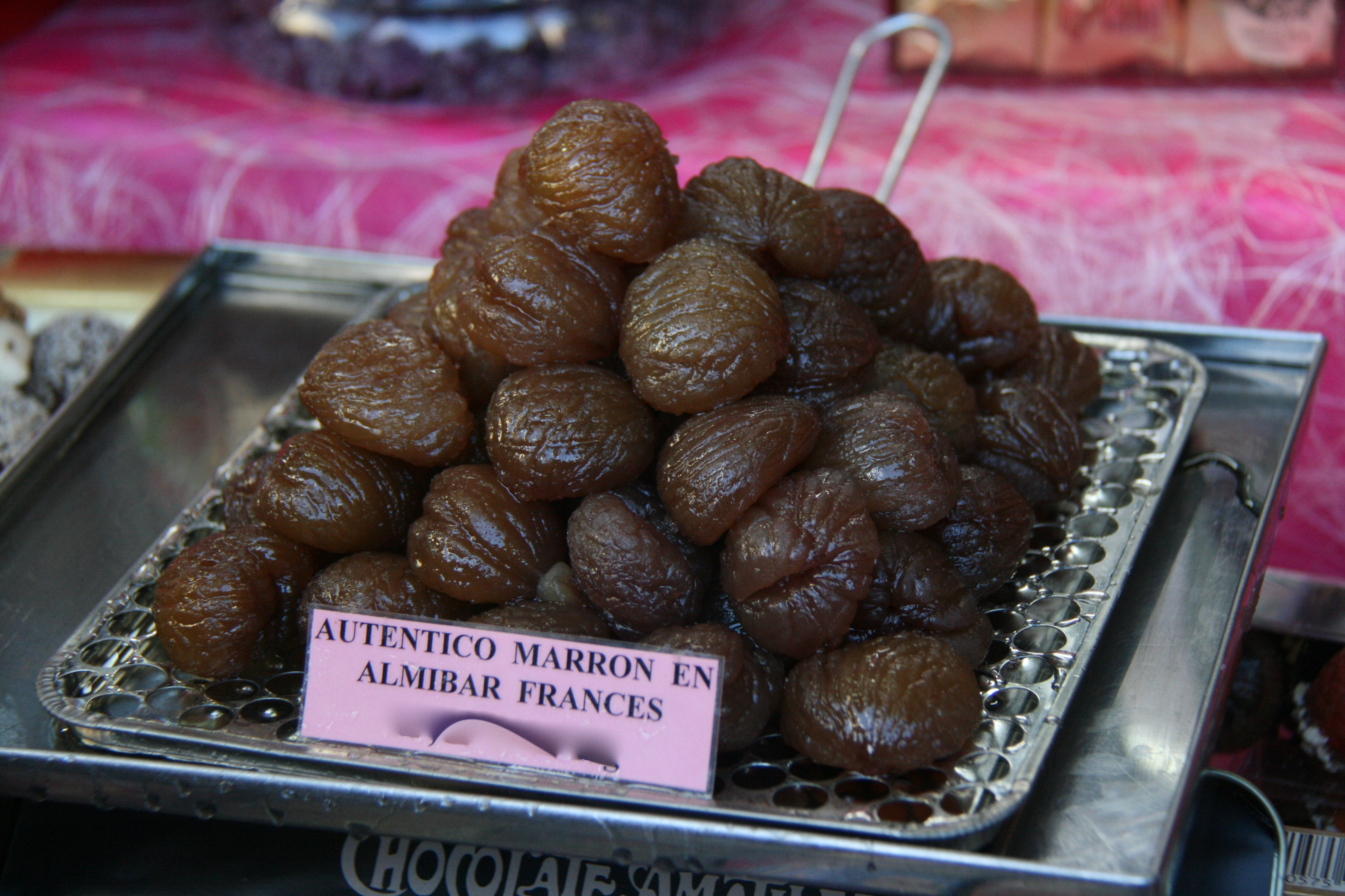 Castañas en almibar